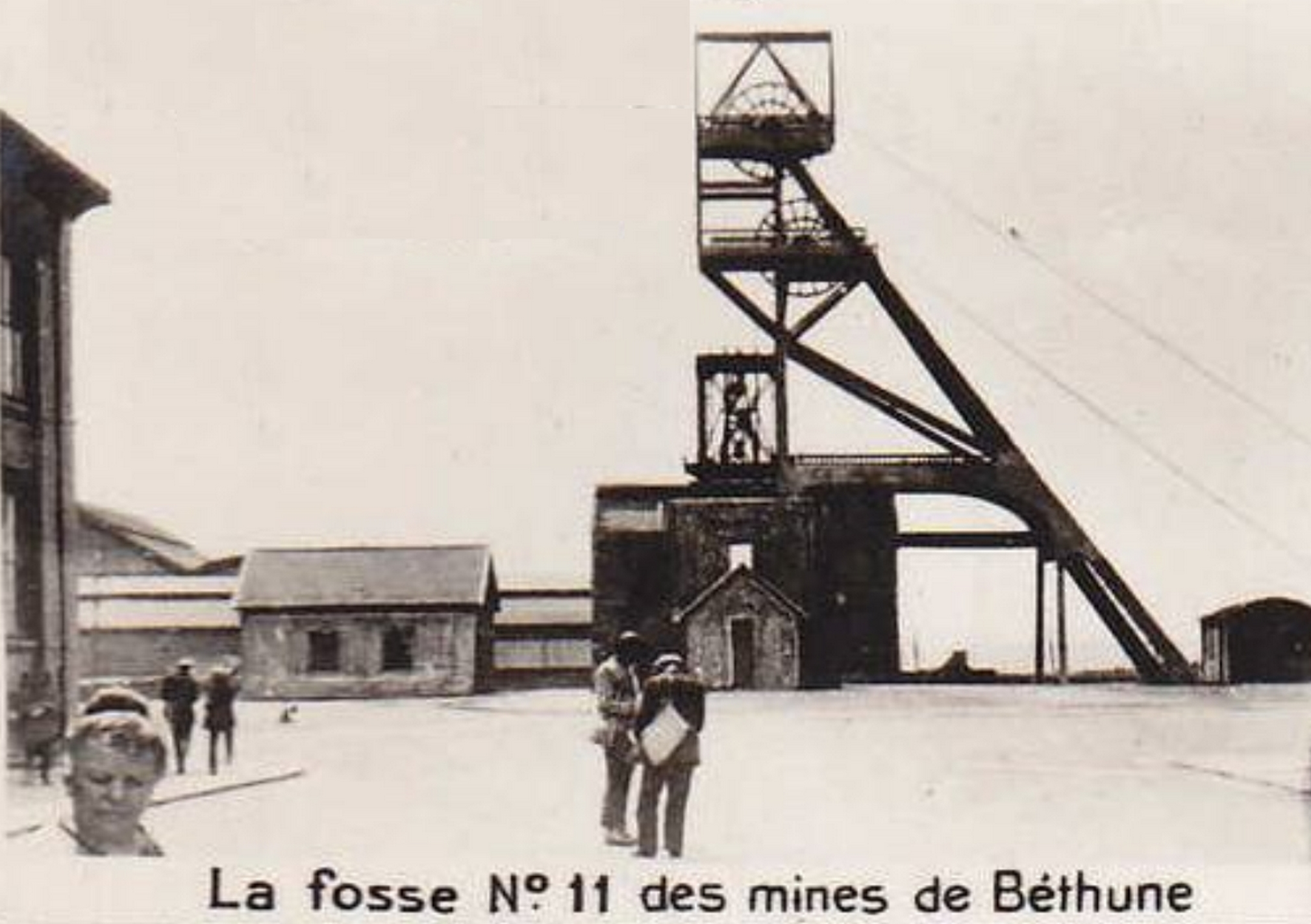 La Fosse n° 11 - 11 bis de la Compagnie des mines de Béthune était un charbonnage constitué de deux puits situé à Grenay, Pas-de-Calais, Nord-Pas-de-Calais, France.